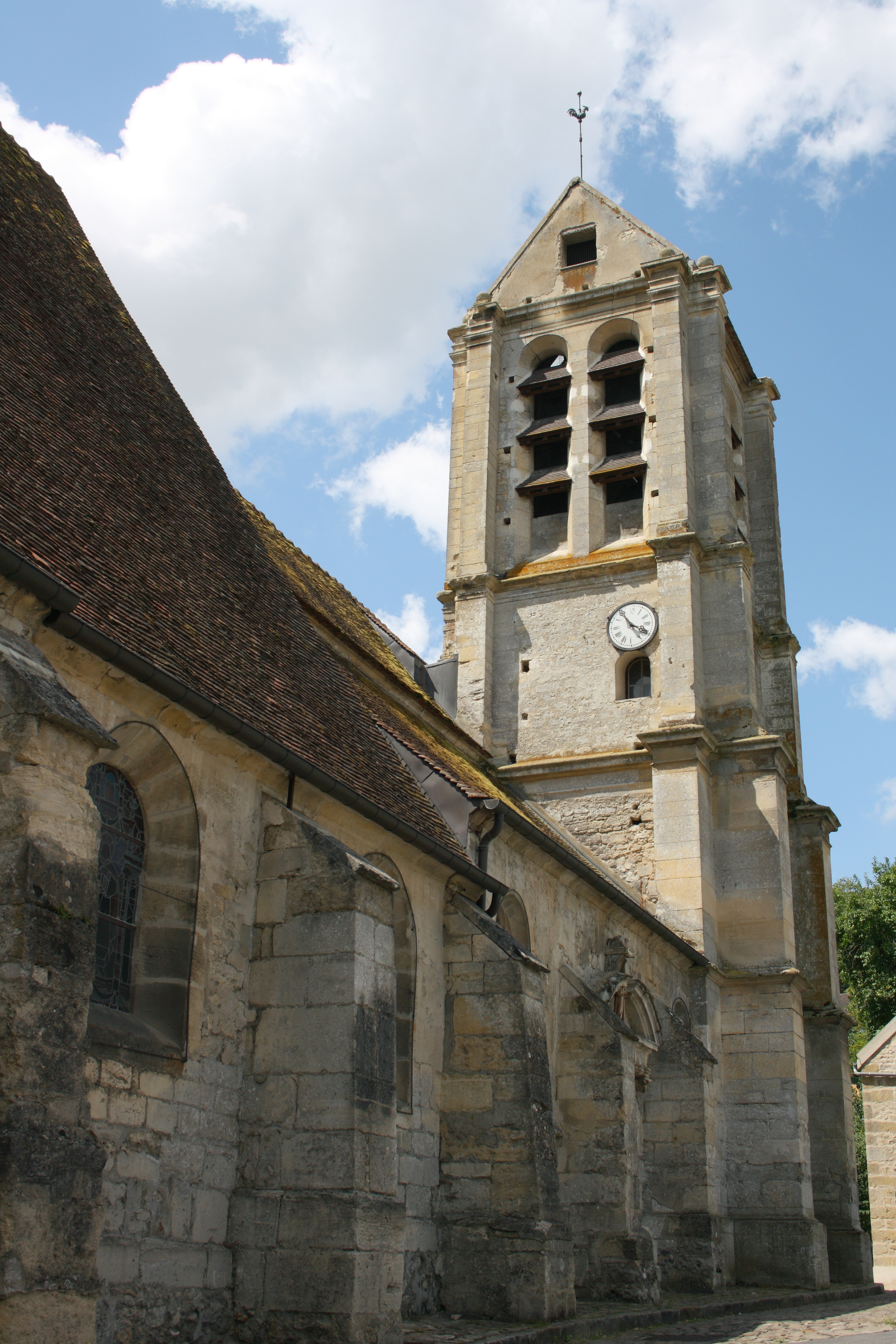 katholische Kirche Notre-Dame-de-l'Assomption in Vauréal